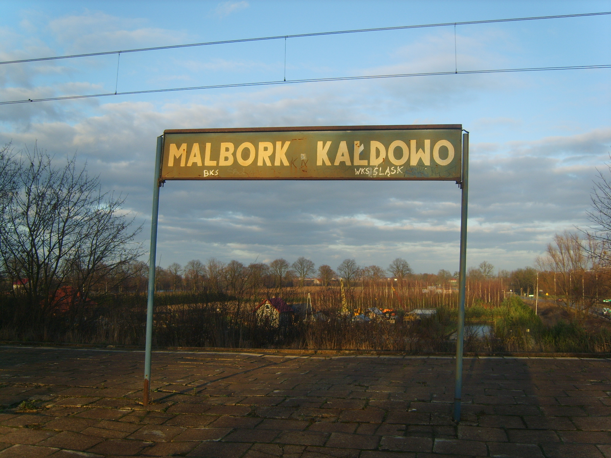 Malbork Kałdowo - tablica przystankowa.